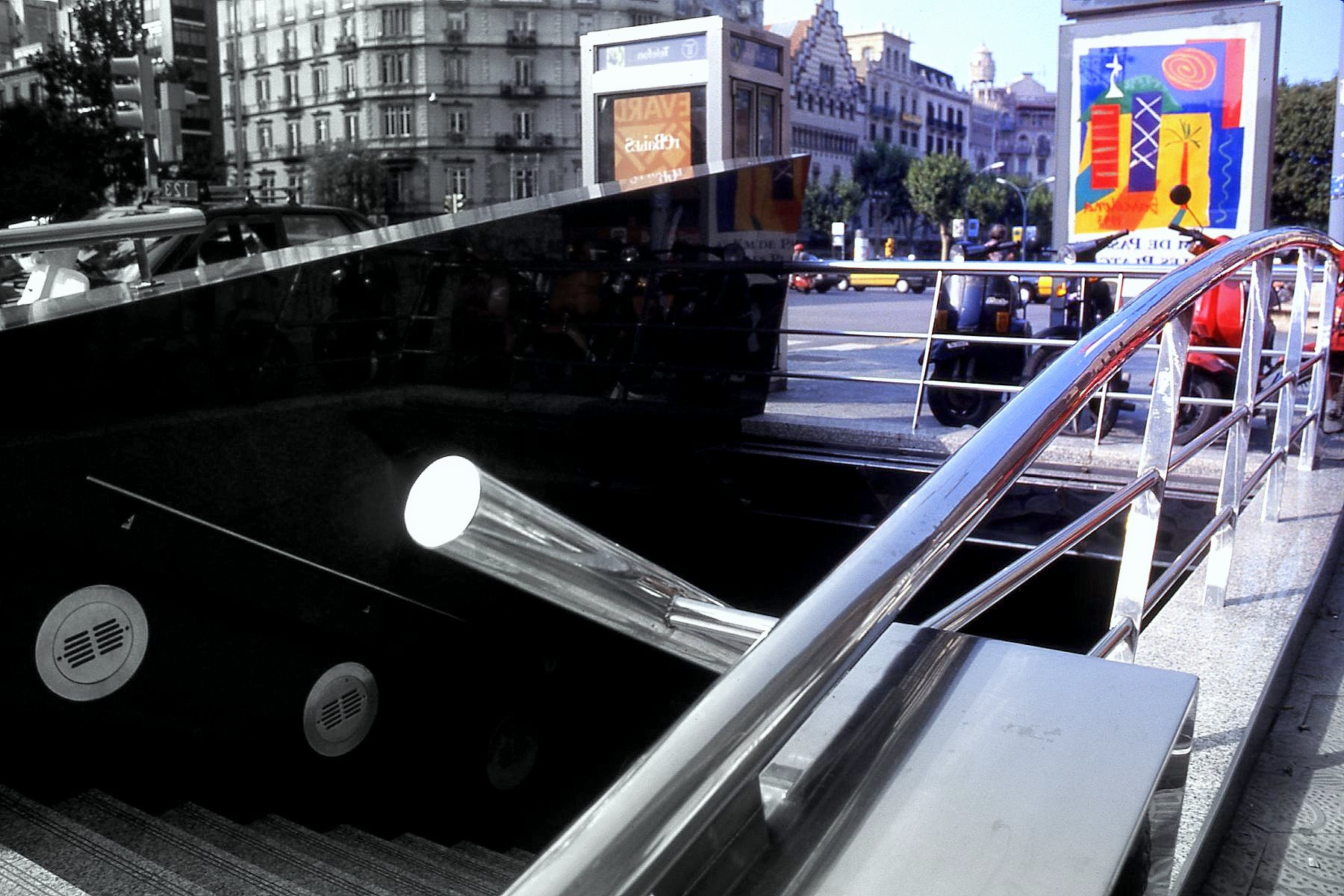 Acceso Estación Paseo de Gracia ("la deconstrucción del modelo Barcelona")